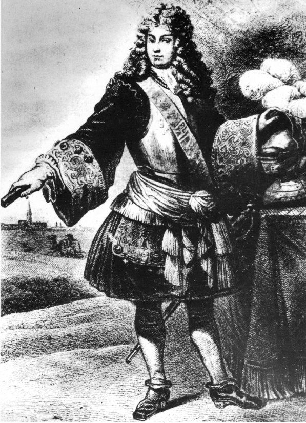 portrait du chevalier de Chamilly